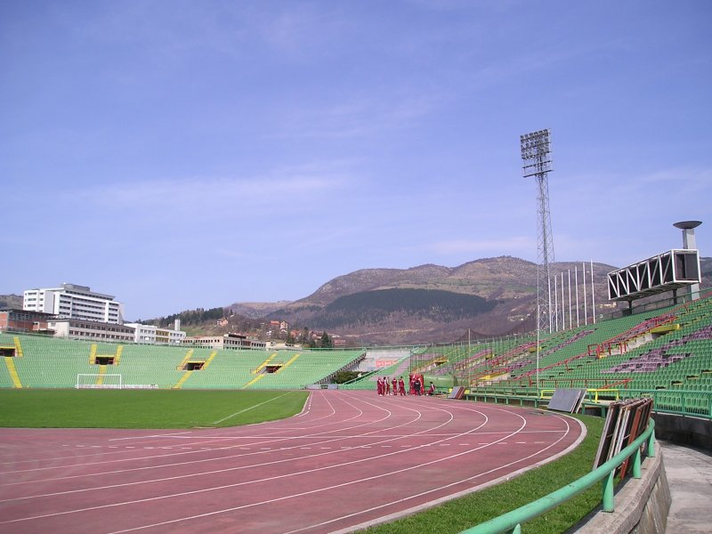 Stadium Asim Ferhatovic HaseP1010189